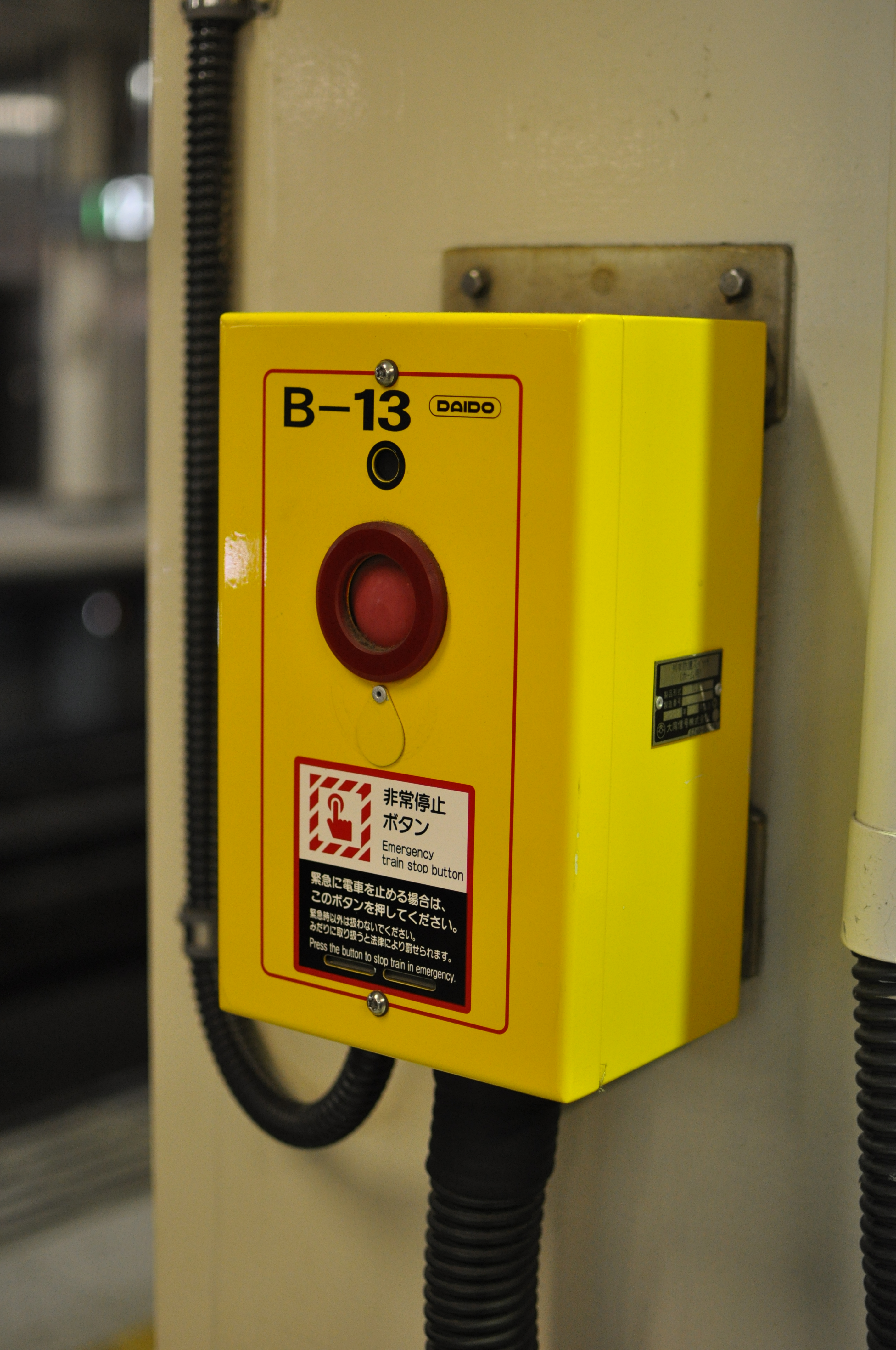 仙台駅(Sendai Station), 非常停止ボタン